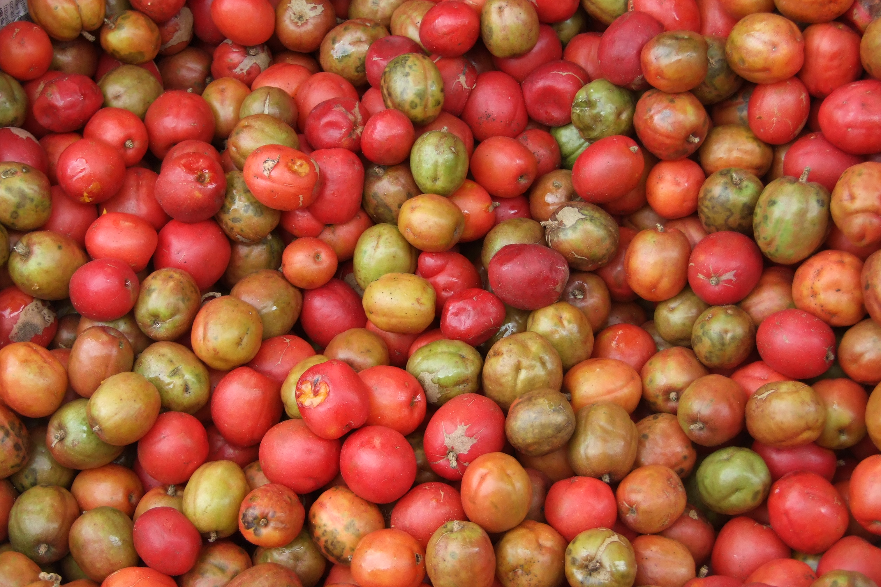 Jocote (Fruit). Pictured in Antigua, Guatemala.